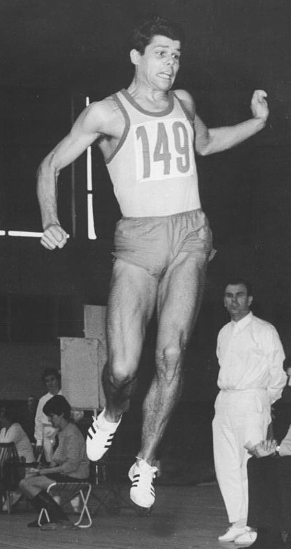 Jörg Drehmel Zentralbild Kutscher 15.2.70 Berlin: VII. Hallen-Leichtathletik-Meisterschaften der DDR - Sieg für Dremel. Der Potsdamer ASK-Sportler Jörg Dremel wurde mit 16,21 Meter überlegener Sieger des Dreisprungwettbewerbes und damit neuer Meister der DDR.